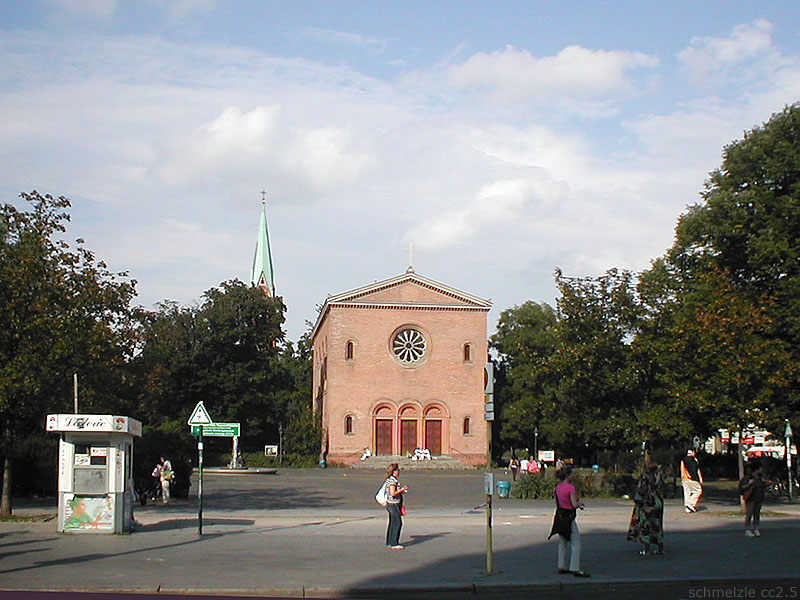 Leopoldplatz in Berlin-Wedding mit Alter Nazerethkirche, im Hintergrund Kirchturm der Neuen Nazarethkirche